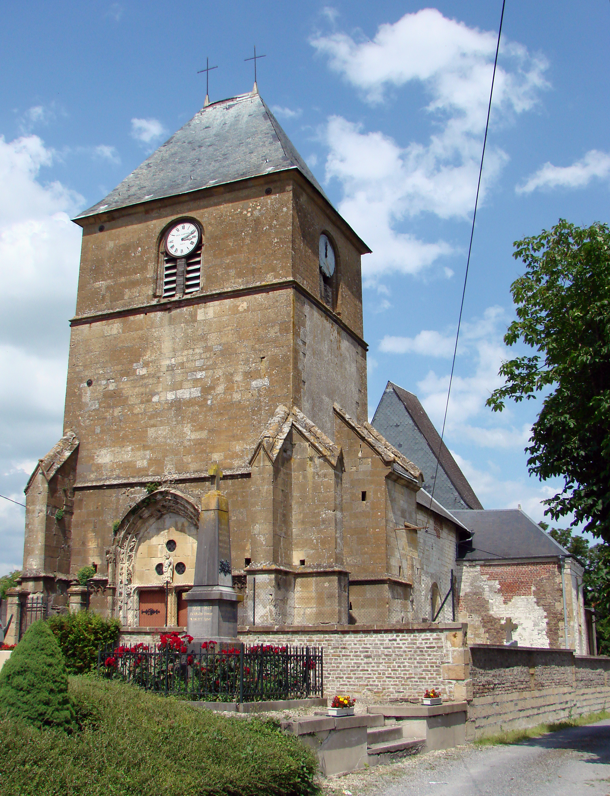 Eglise Saint-Nicolas, à Bourcq, Ardennes (O8). Tour-porche du XVème siècle.